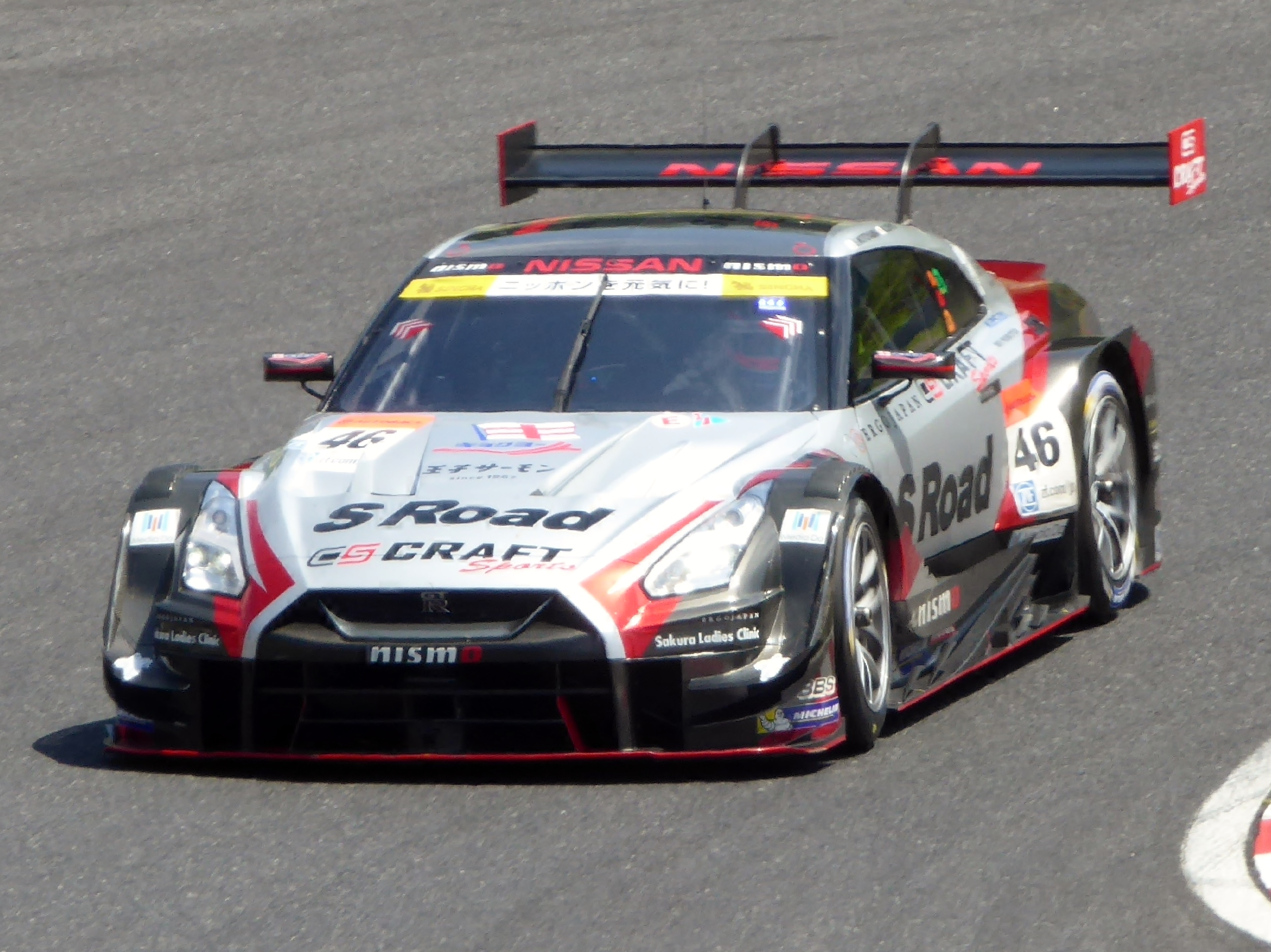 2017年鈴鹿1000㎞に於いて46号車S Road CRAFTSPORTS GT-Rを撮影。